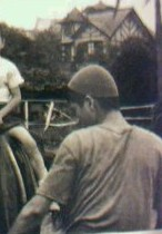 中文（台灣）: 臺北市圓山別莊的騎馬場。